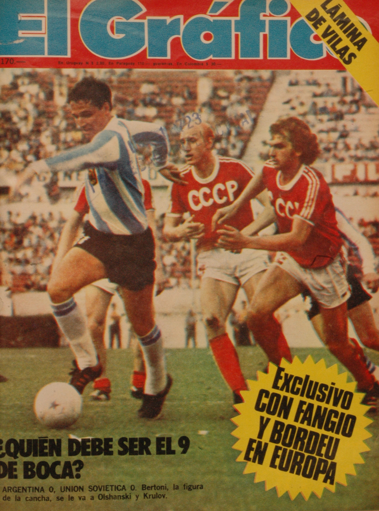 El Grafico del 30 de Noviembre de 1976. Edicion 2982